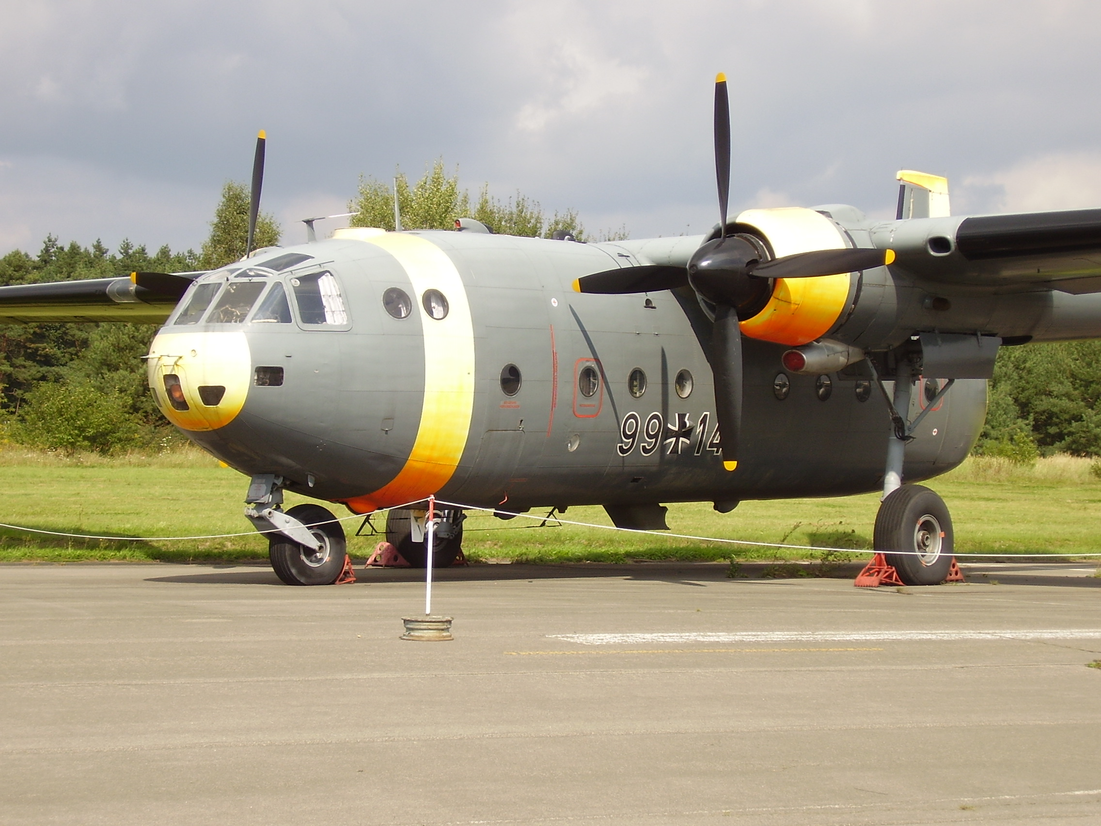 Luftwaffenmuseum der Bundeswehr; Airforce Museum of the Bundeswehr; Berlin-Gatow, Nord 2501 Noratlas